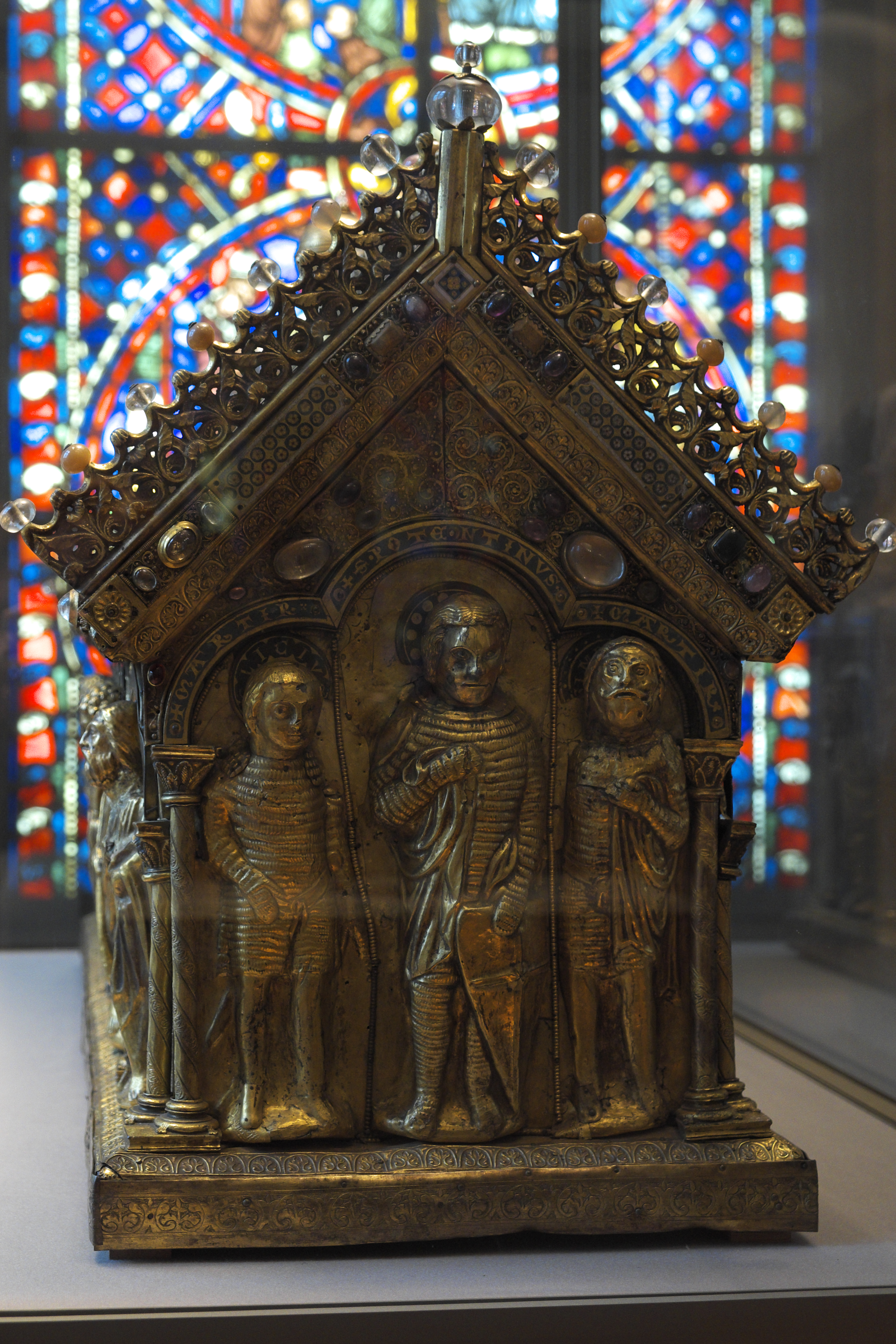 Potentinusschrein aus dem ehemaligen Prämonstratenserkloster Steinfeld in Steinfeld im Kreis Euskirchen (Nordrhein-Westfalen/Deutschland), heute im Musée du Louvre in Paris (Frankreich), Goldschmiedearbeit, um 1220/40 in der Gegend von Trier geschaffen; Darstellung: Potentinus und seine Söhne Felicius und Simplicius